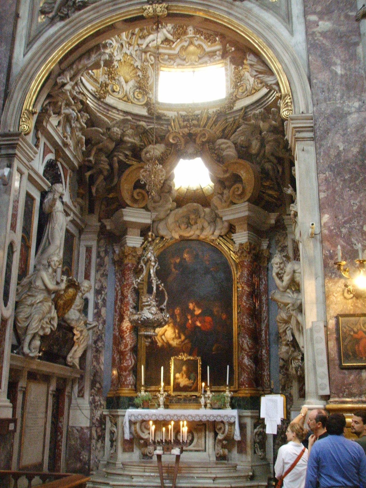 Basilica della santissima annunziata, Cappella di San Giuliano o di San Giuseppe